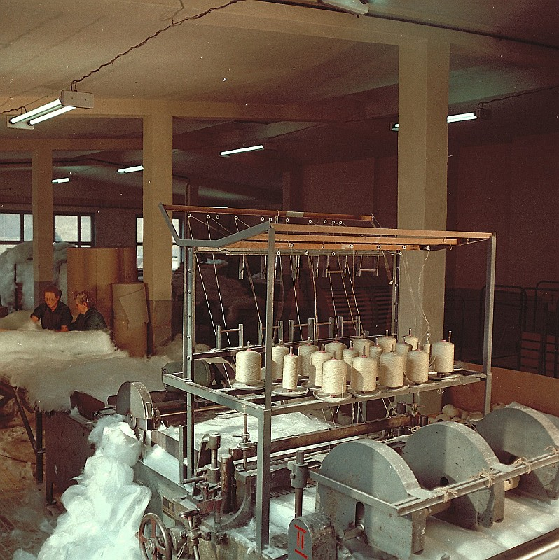 Original image description from the Deutsche Fotothek Facharbeiter für Glastechnik